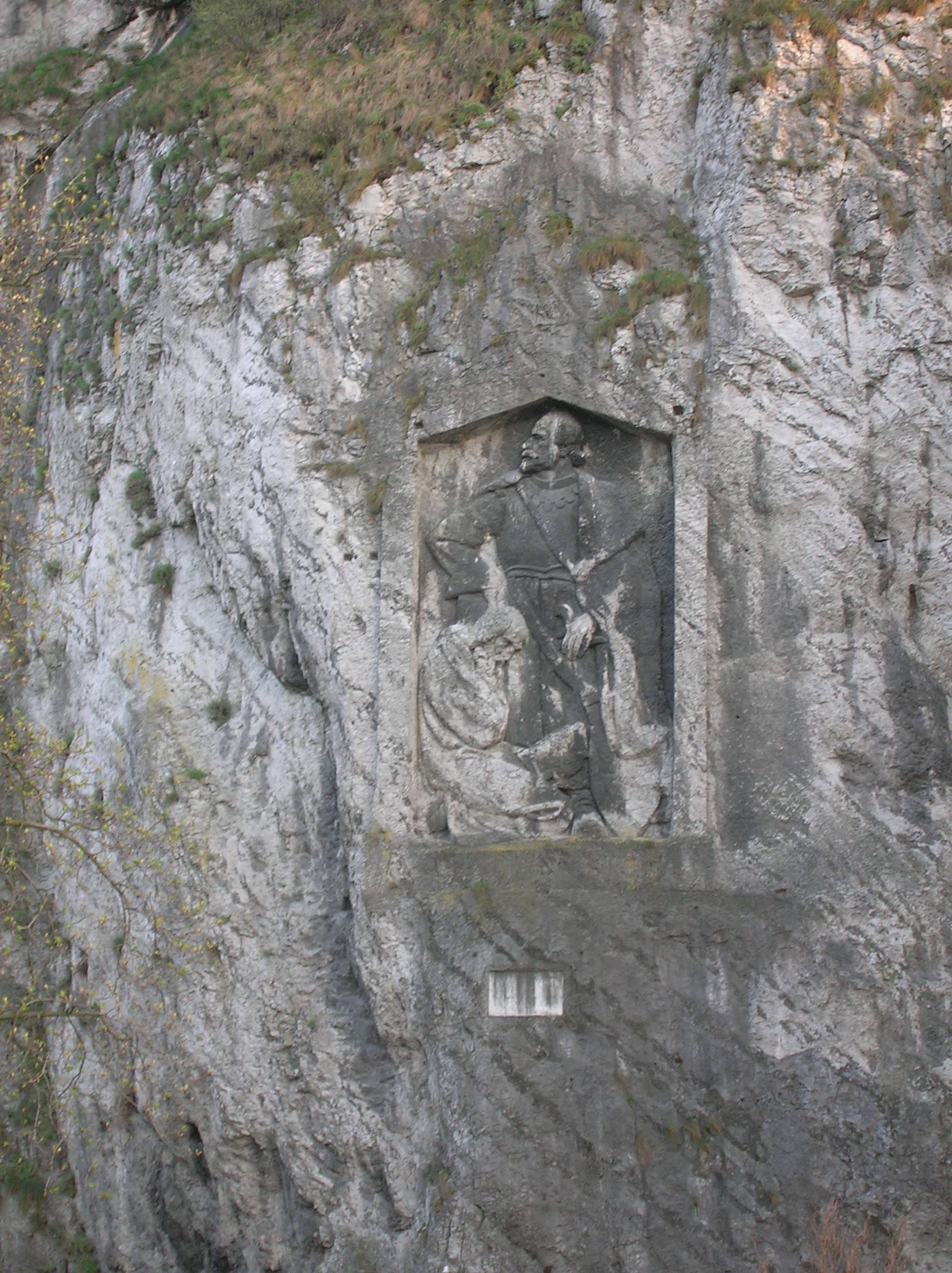 hradná skala, Trenčín. Reliéf Jána Jiskru z Brandýsa; reliéf Víťaznej Hungárie podľa návrhu sochára Michala Karu (vytesaný 1915-1916)